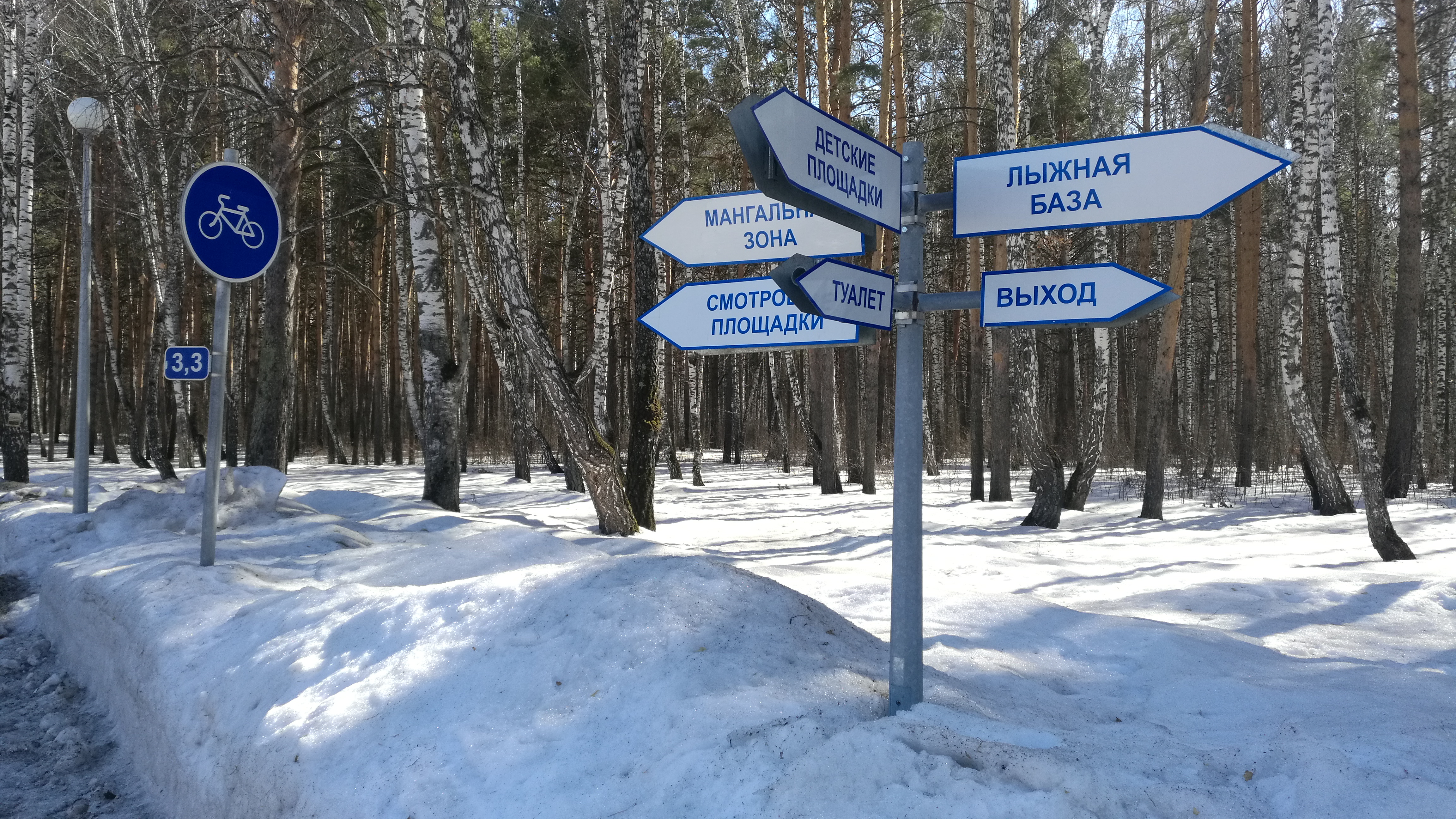 Gilova bosko. Tjumeno, Rusio.